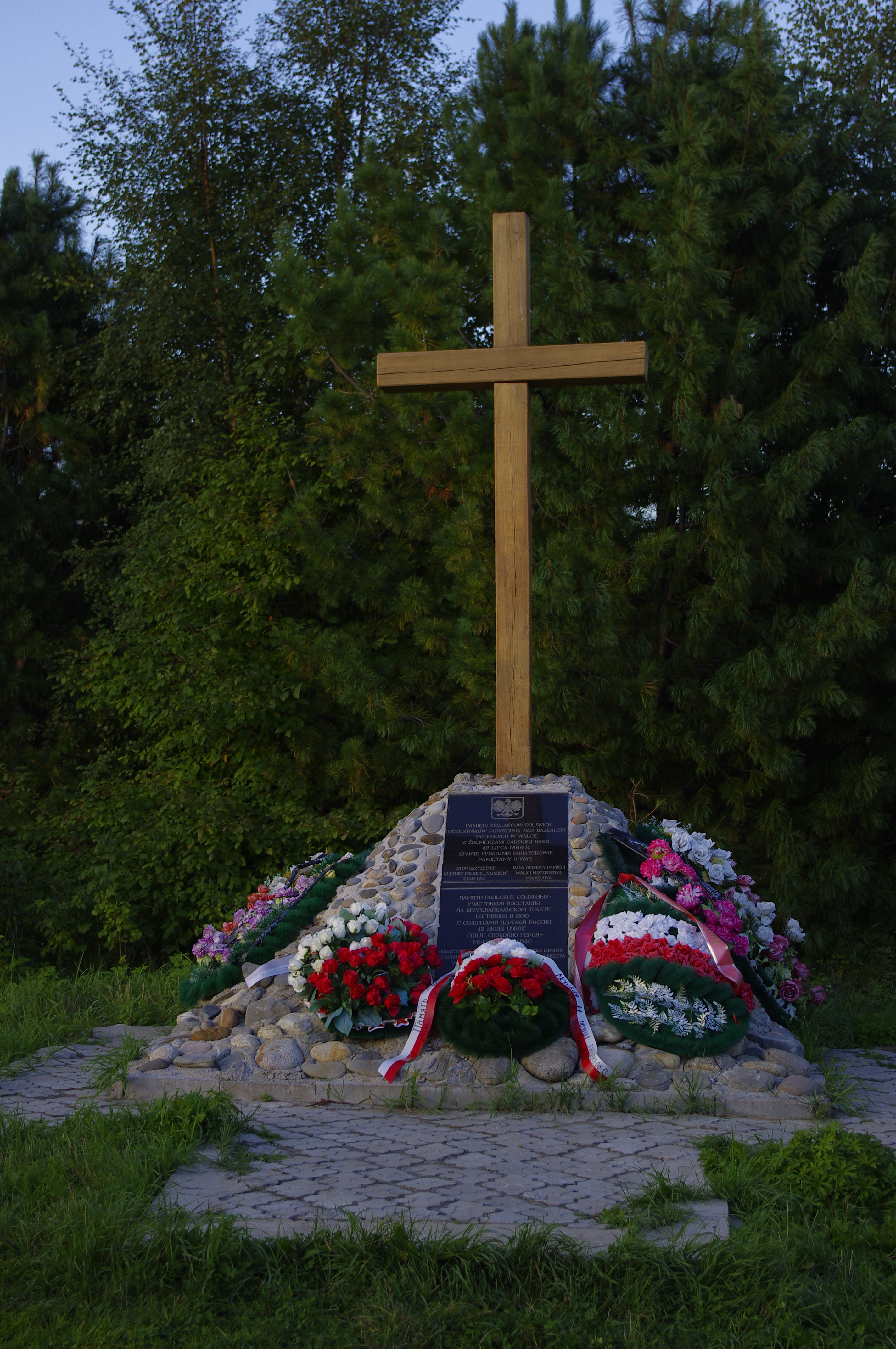 Okolice wsi Miszycha, południowo-wschodni brzeg jeziora Bajkał. Lato 2013.